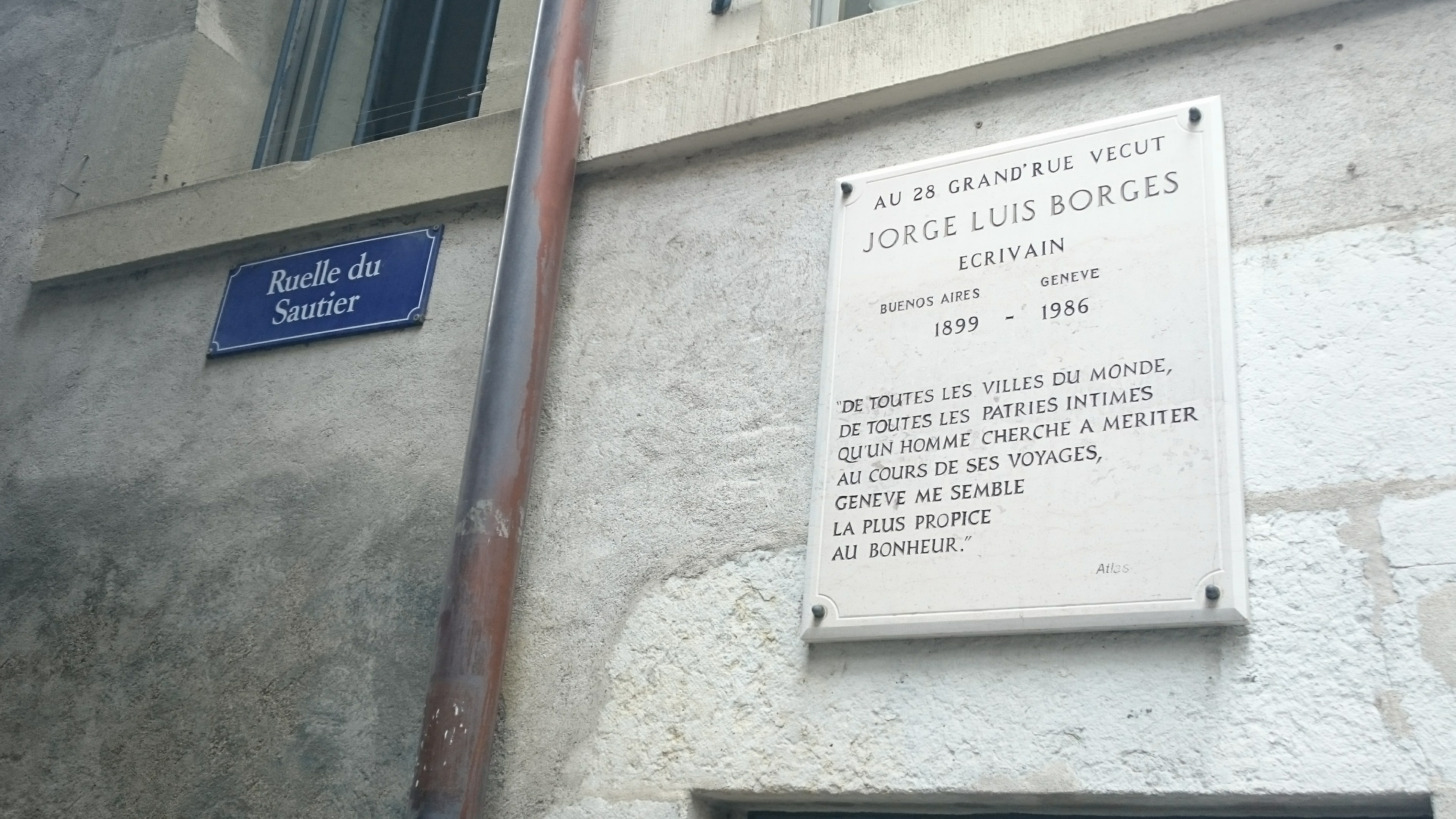 Casa donde vivió Jorge Luis Borges en Ginebra (Suiza), en el número 28 de la Grande Rue.